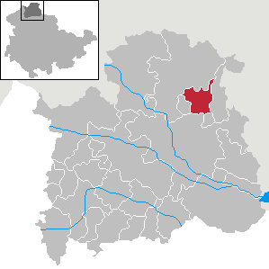 Gemeinde Neustadt/Harz in Thüringen, Landkreis Nordhausen